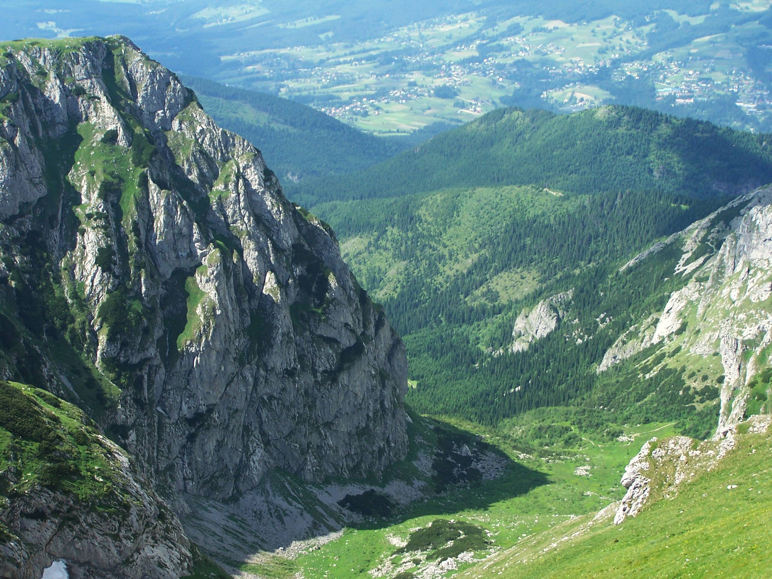 Wielka Turnia (Tatra Mountains - Dolina Małej Łąki)